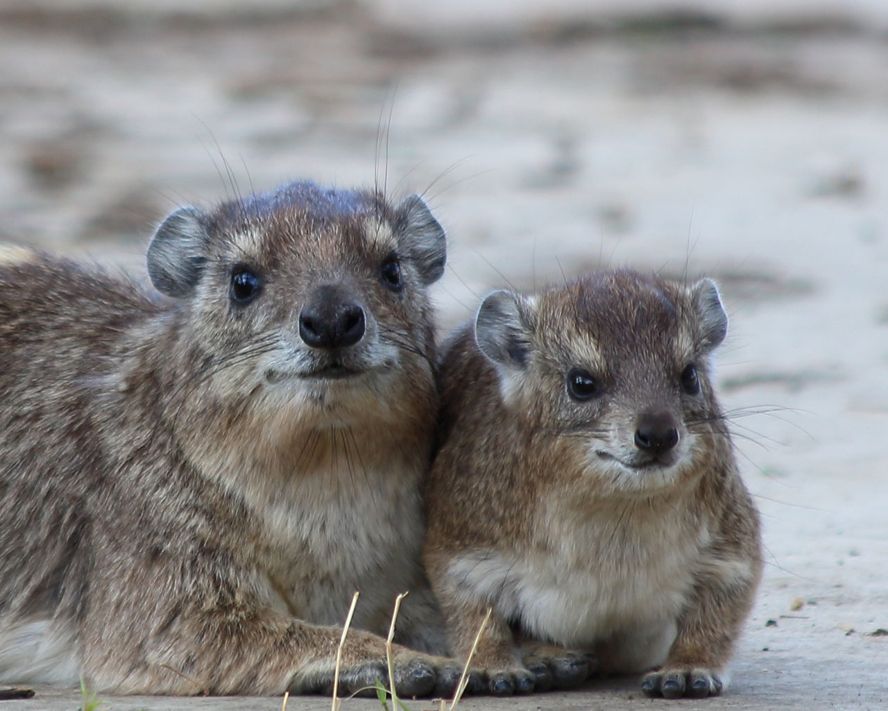 Daman des rochers, Serengeti (Tanzanie)